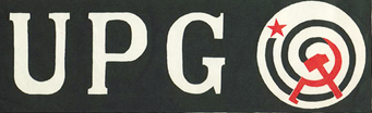 Logo da UPG nos 70.